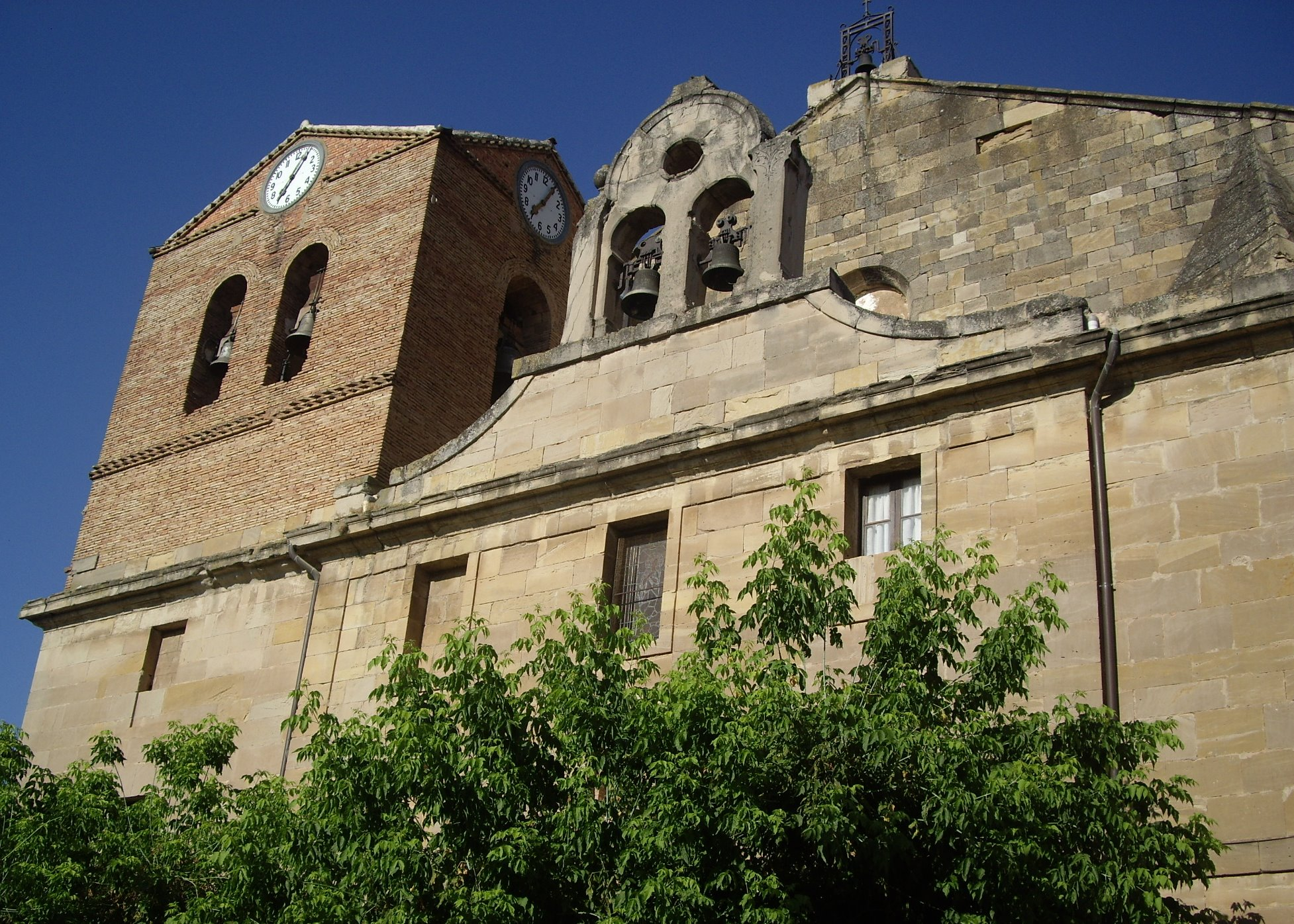 Iglesia de San Pedro en Lardero, La Rioja - España.